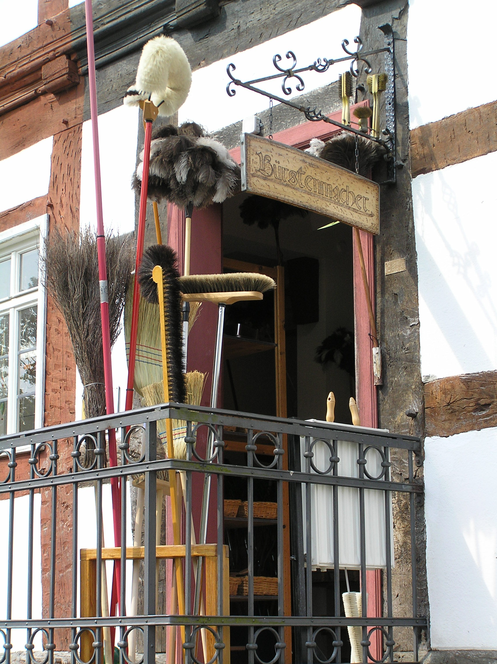 Verkauf von Produkten des Bürstenmachers im Hessenpark, Neu-Anspach, Deutschland